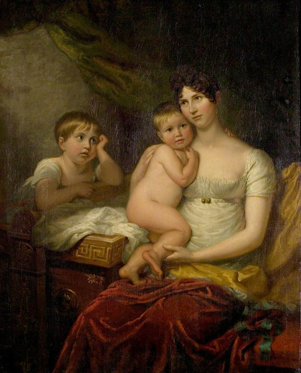 Portrait de Mme Thomas Hope et de ses fils. Huile sur toile (127.6 x 104 cm) conservée à l'Université de Nottingham (UON.033).